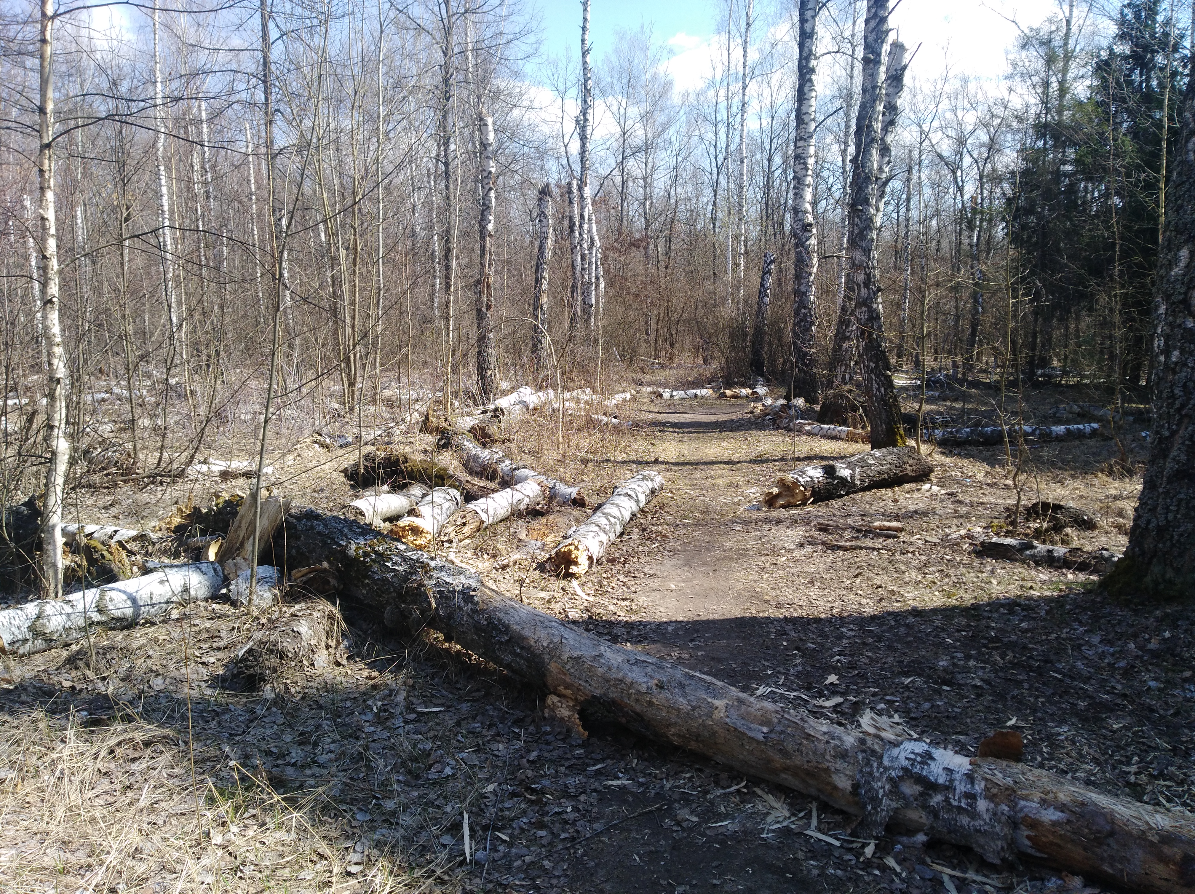 Засохшие берёзы